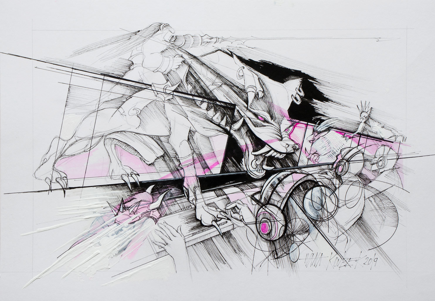 Mischtechnik auf Karton, 50 x 35 cm